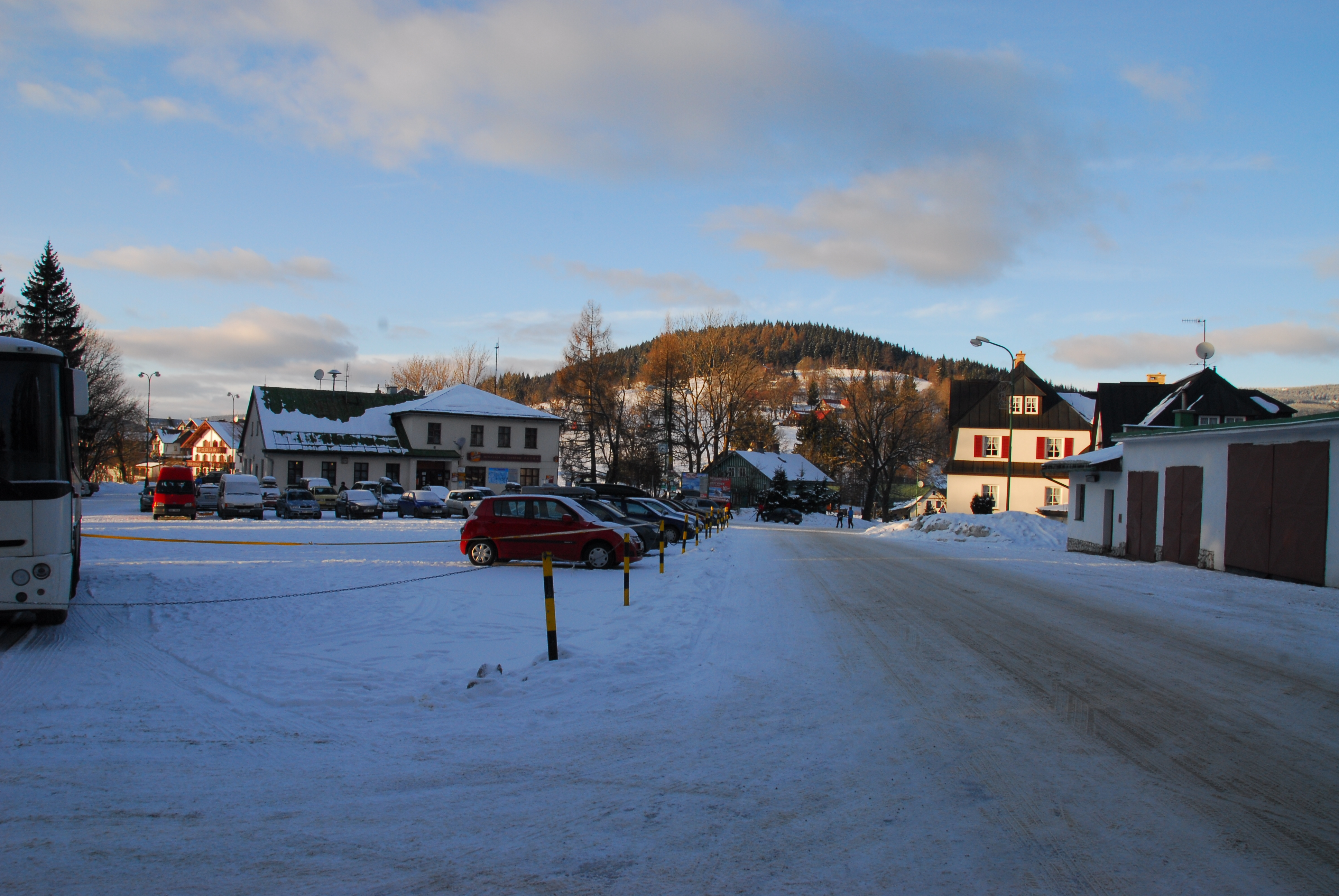 Náměsíčko ve Strážném v zimní sezóně roku 2011.